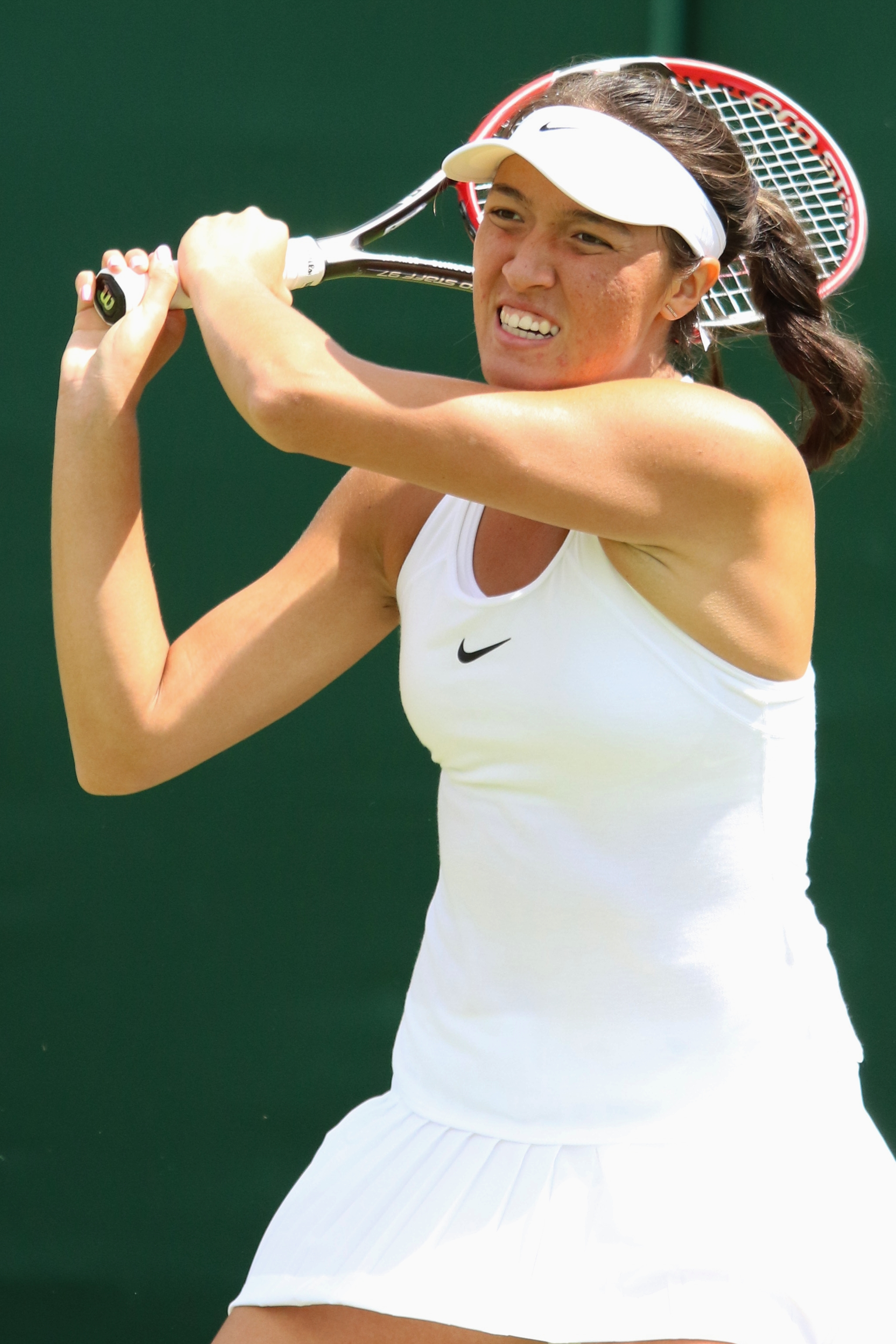 Crawford WM16 (17)